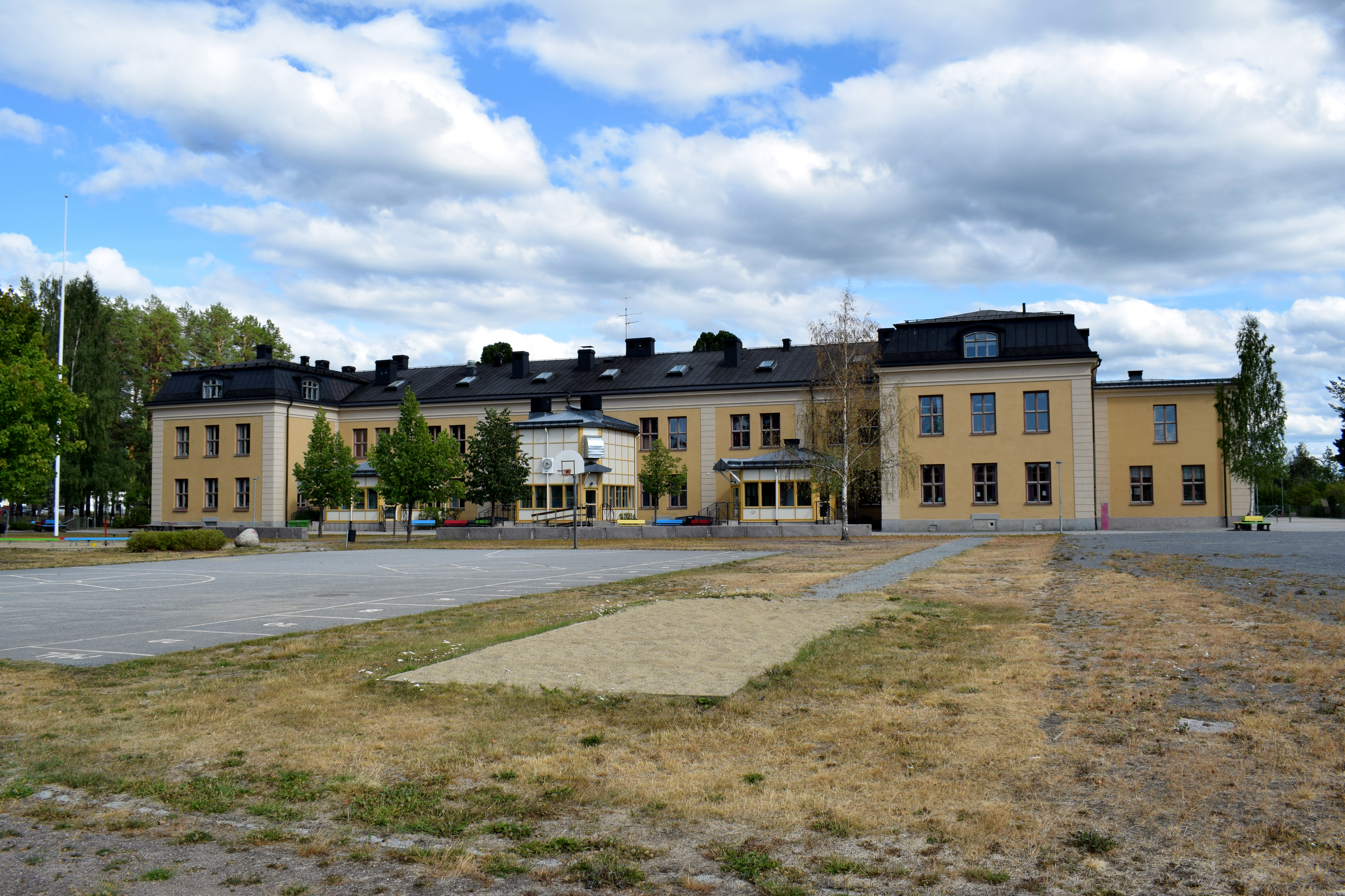 Kasern vid det före detta trängregementet i Sollefteå.